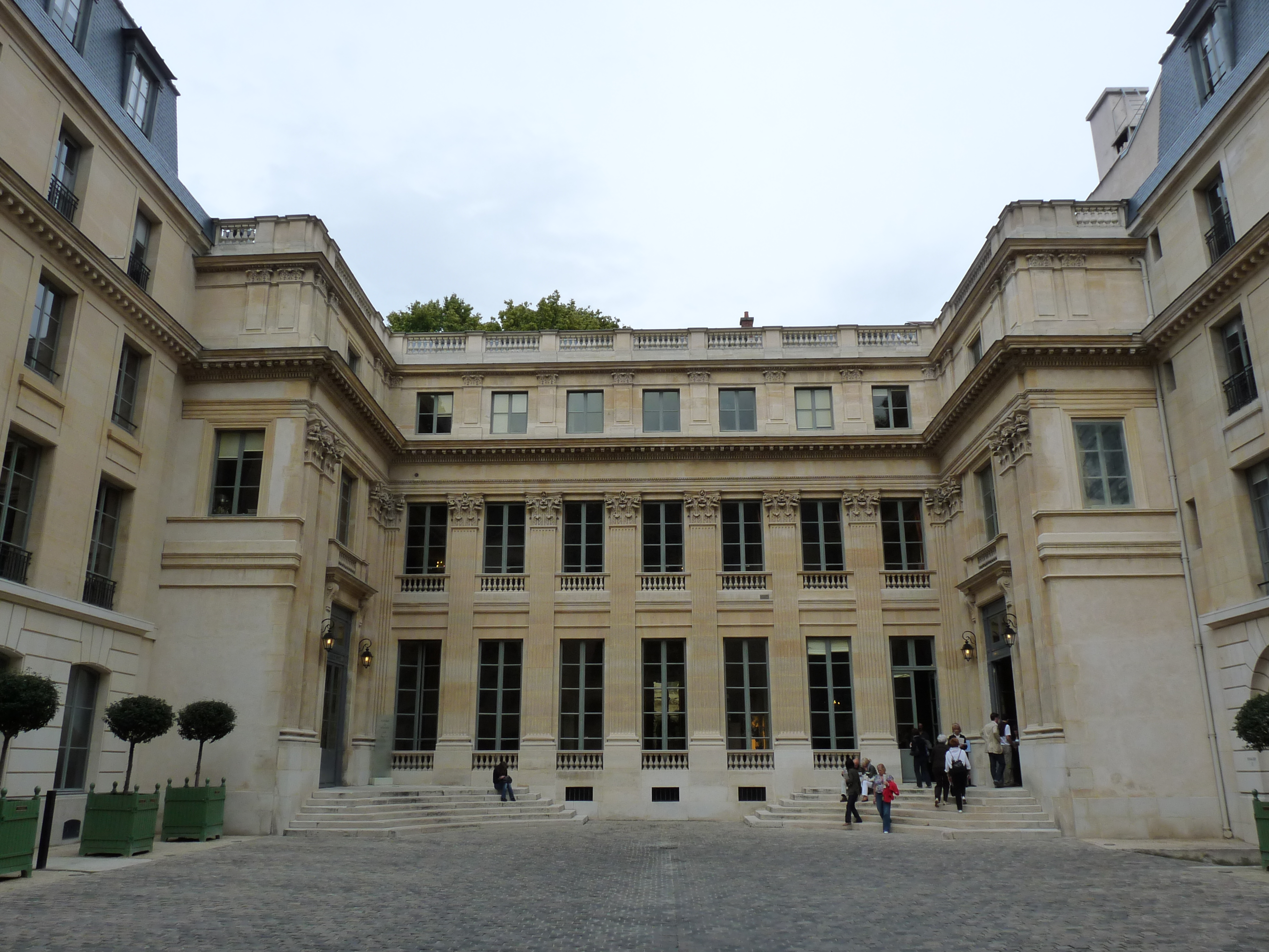 La facade, côté cours, de l'hôtel de Rochechouart à Paris, siège du ministère de l'éducation nationale. Photo prise lors des journées du patrimoine 2011.